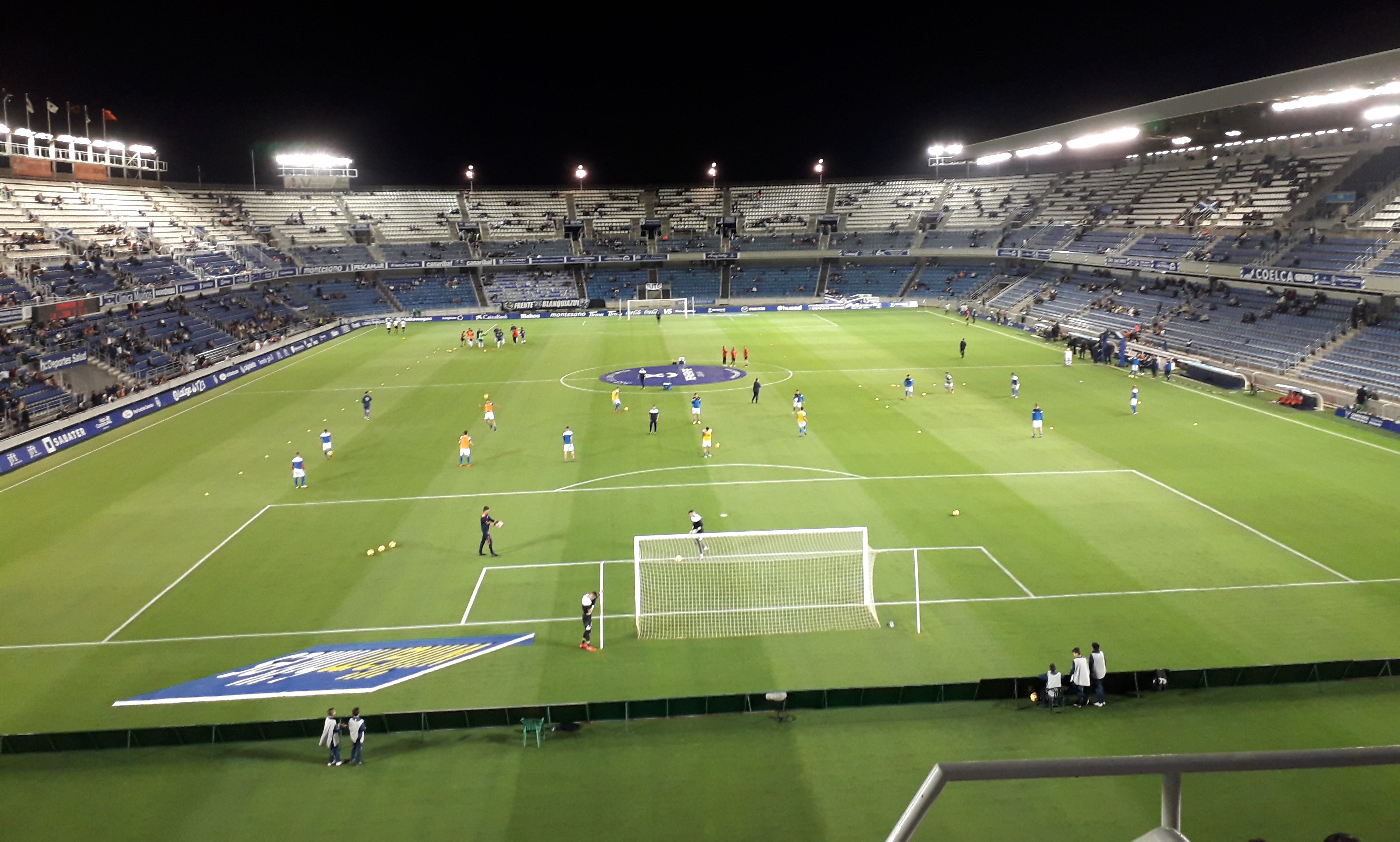 Imagen del Estadio Heliodoro Rodríguez López